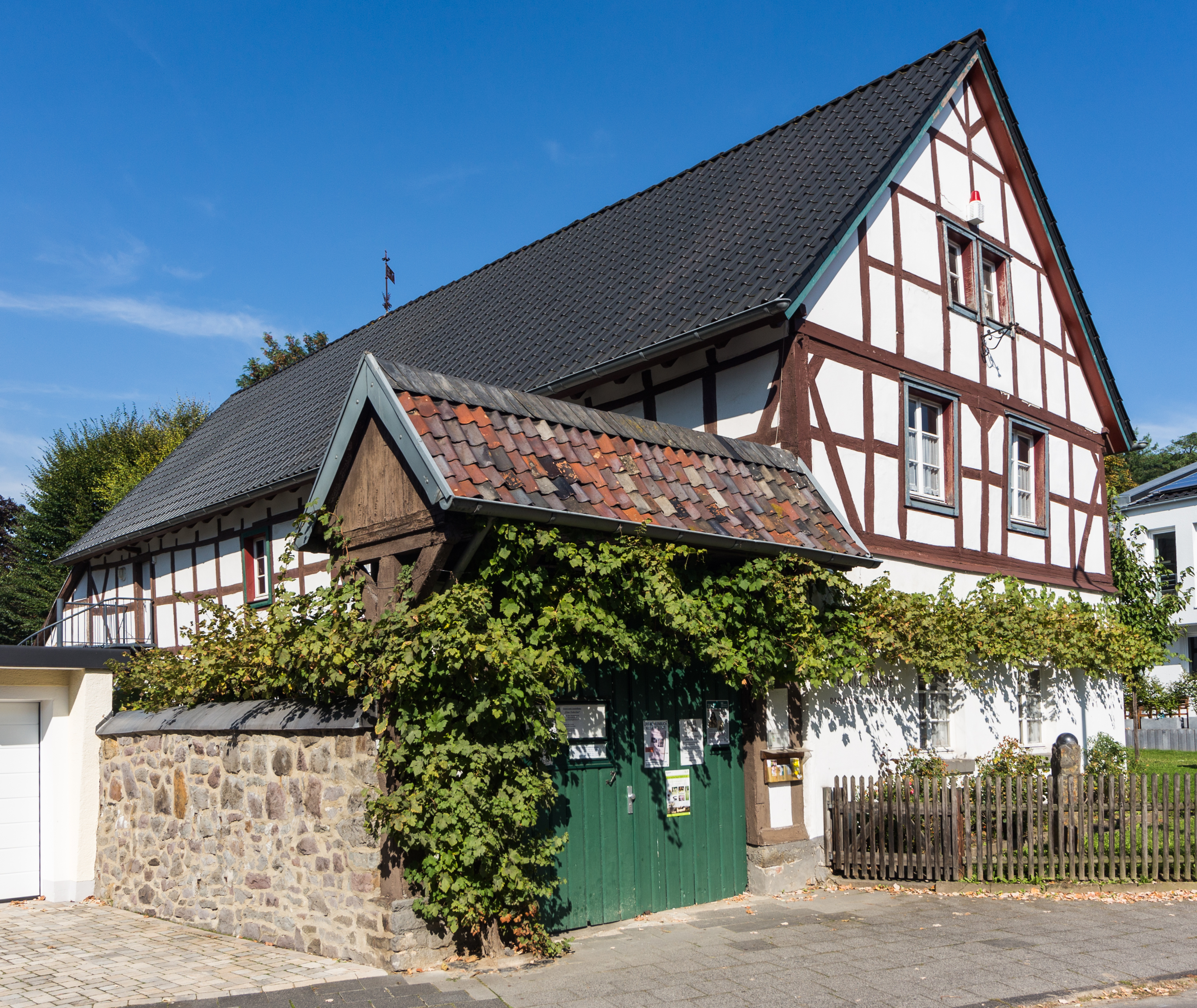 „Brückenhofmuseum“, Bachstraße 93, Königswinter-Oberdollendorf This is a photograph of an architectural monument. 142